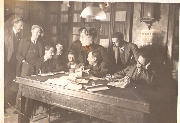 El periodista y político José García Vaso en la redacción del periódico La Tierra. Según el historiador Luis Miguel Pérez Adán, en la fotografía aparece también el poeta Vicente Medina.